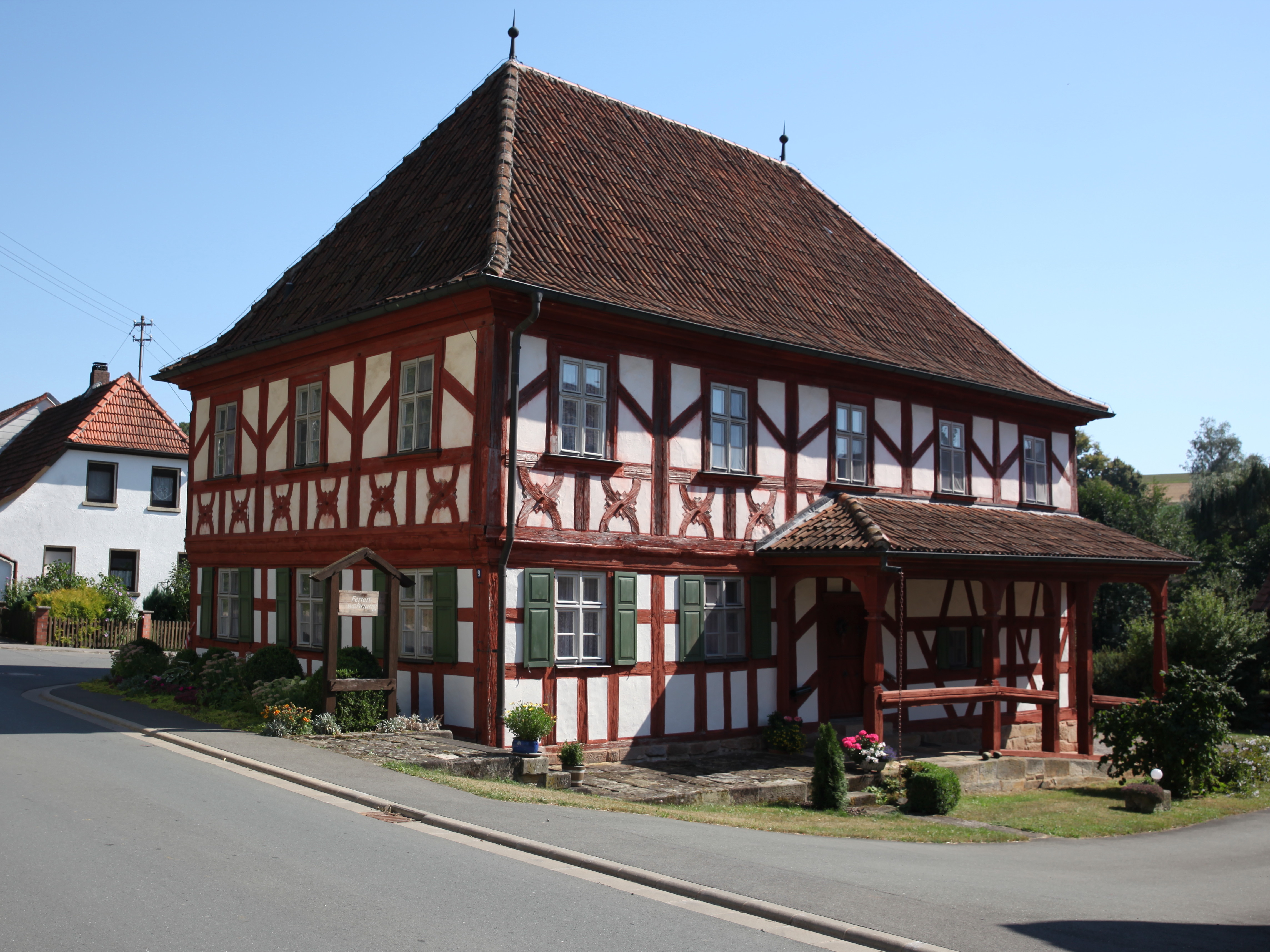 Bauernhaus in Eggenbach